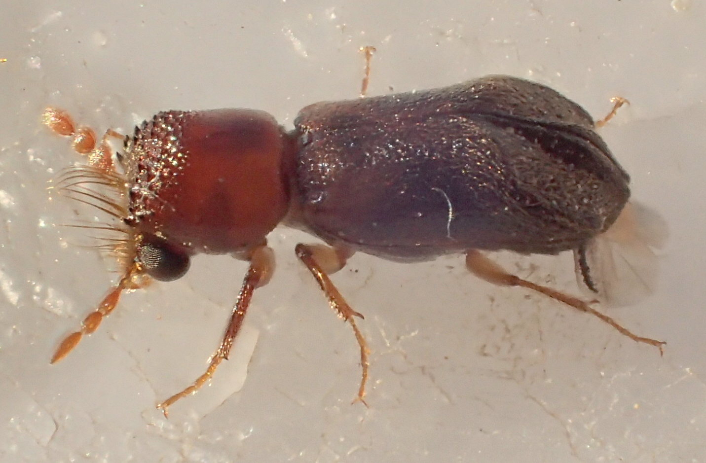 Scobicia pustulata aus Griechenland, Peloponnes, bei Githeon